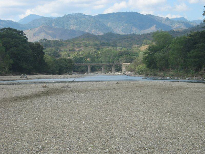 V-238, Honduras